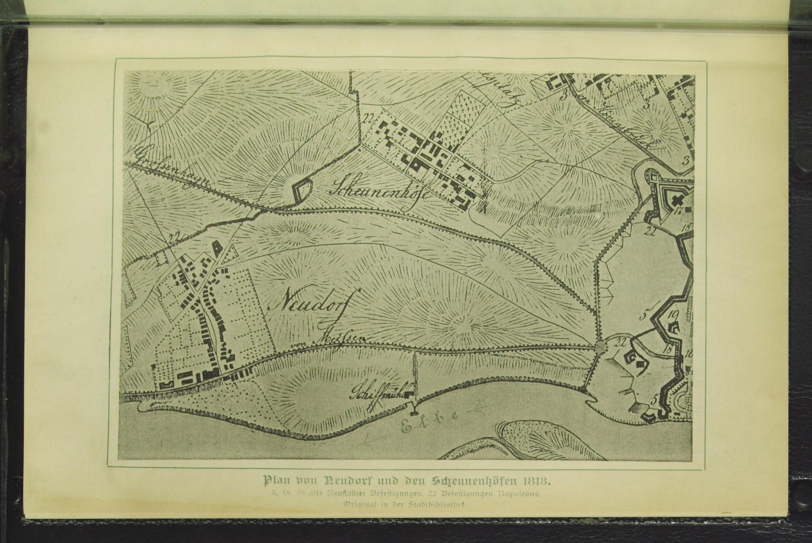 Plan von Neudorf und den Scheunenhöfen 1813, aus:Die kirchliche Vergangenheit von Dresden-Neustadt insonderheit der St. Petri-Gemeindeaus Anlaß der zehnten Wiederkehr des Weihetags der St. Petri-Kirche 5. November 1890